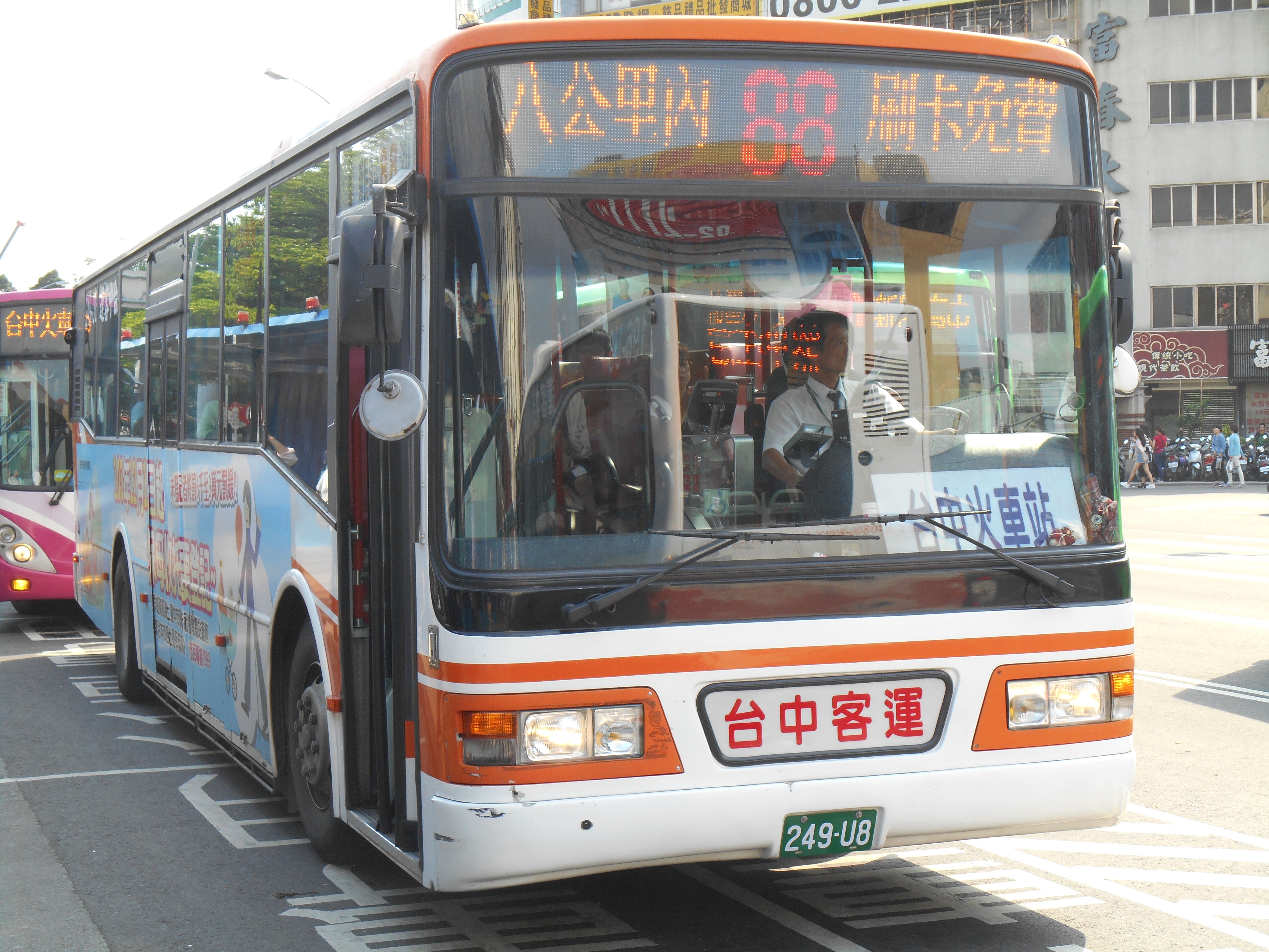 中文（台灣）: 台中客運日野RK8JRSA大客車249-U8。